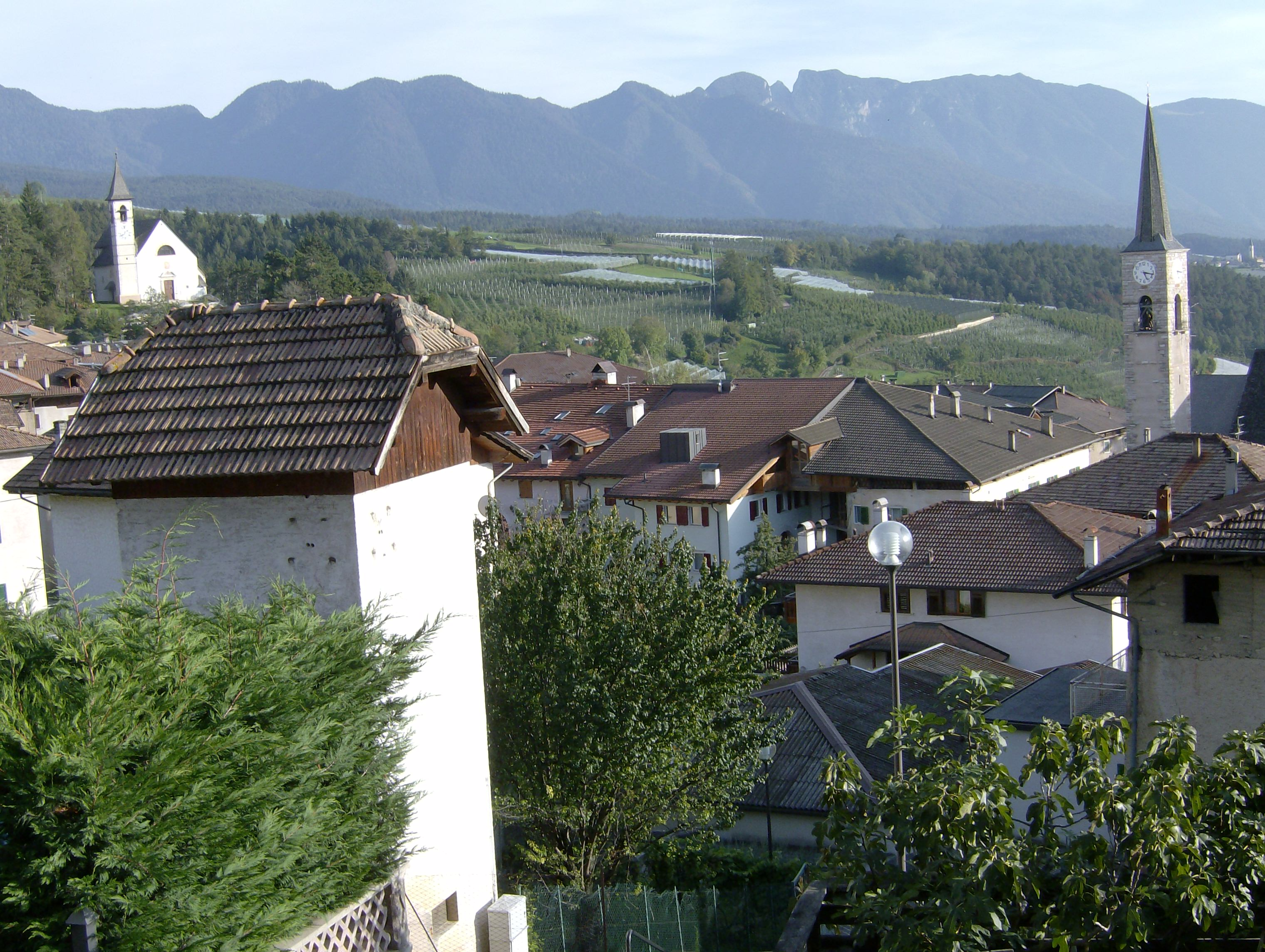 Comune di Coredo